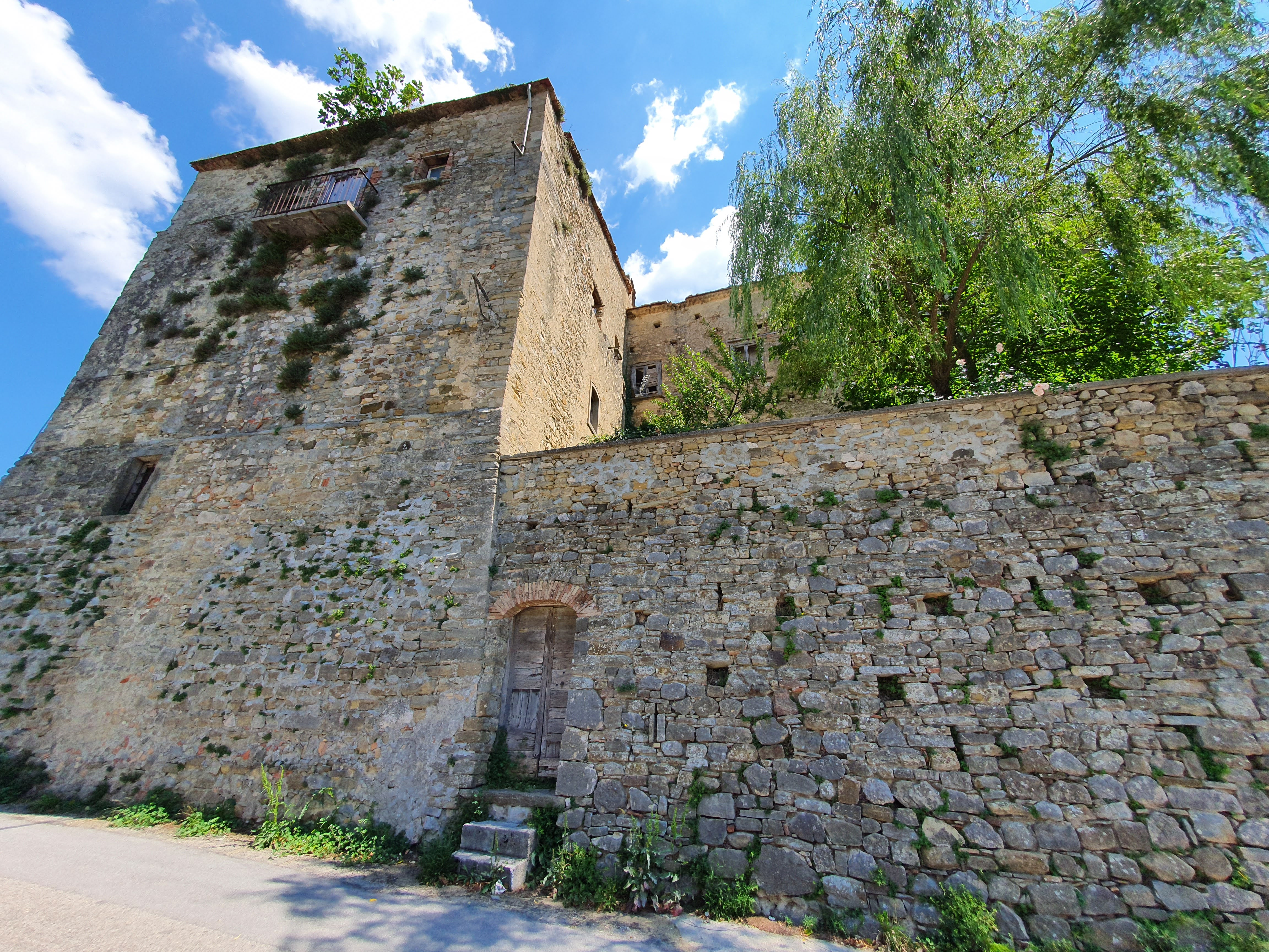 Facciata ovest del Palazzo Marchesale (anche detto Palazzo Imperatore) a Spinete (CB)